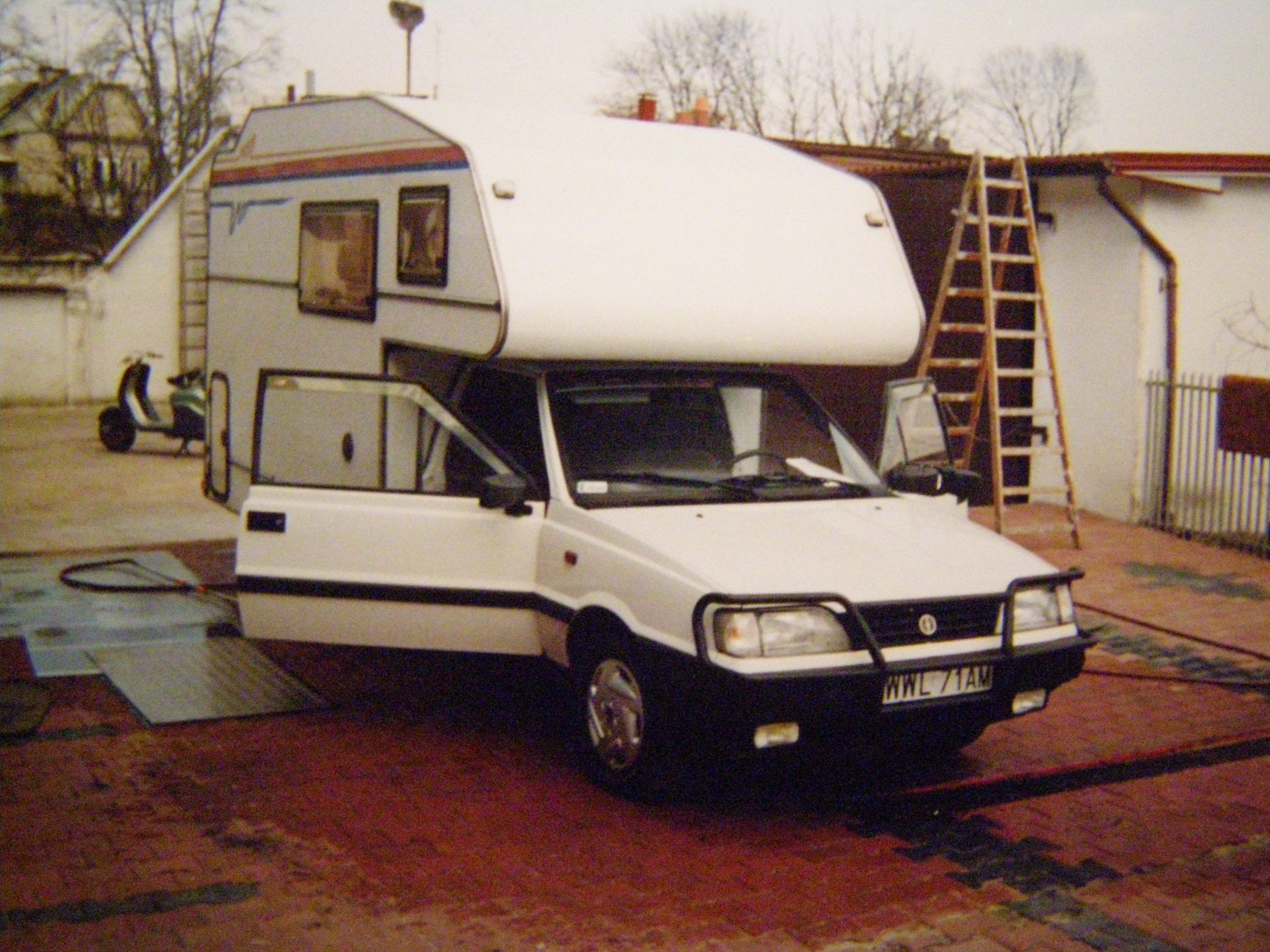 Polonez Truck Kemping